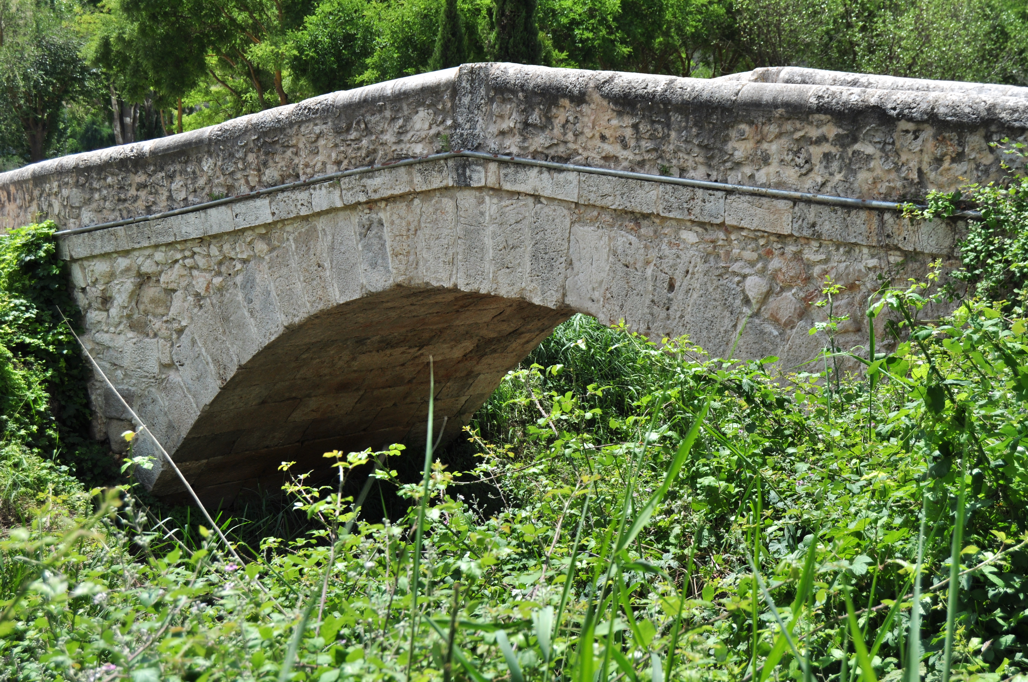 Tielmes - 010